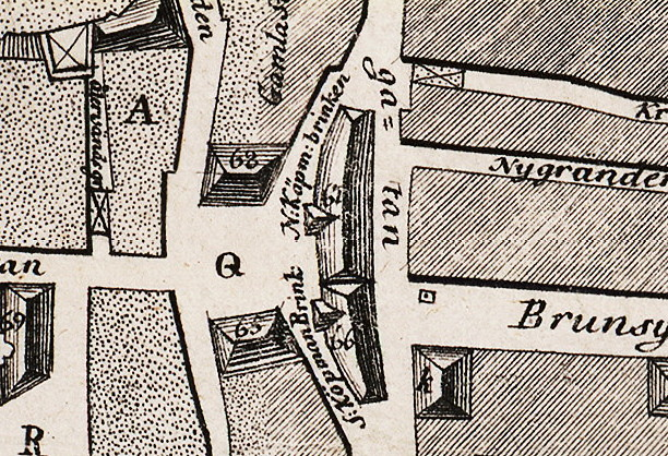 Del av Brolins karta över Gamla stan 1771 visande kvarteret Aceton och Köpmantorget. Q: Lilla Köpmantorget; 65: Grosshandlaren H: Niclas Paulis Hus; 66: Fru Burmans hus; 67: Sjöbergska huset; 68: Fru Abrahmansons hus